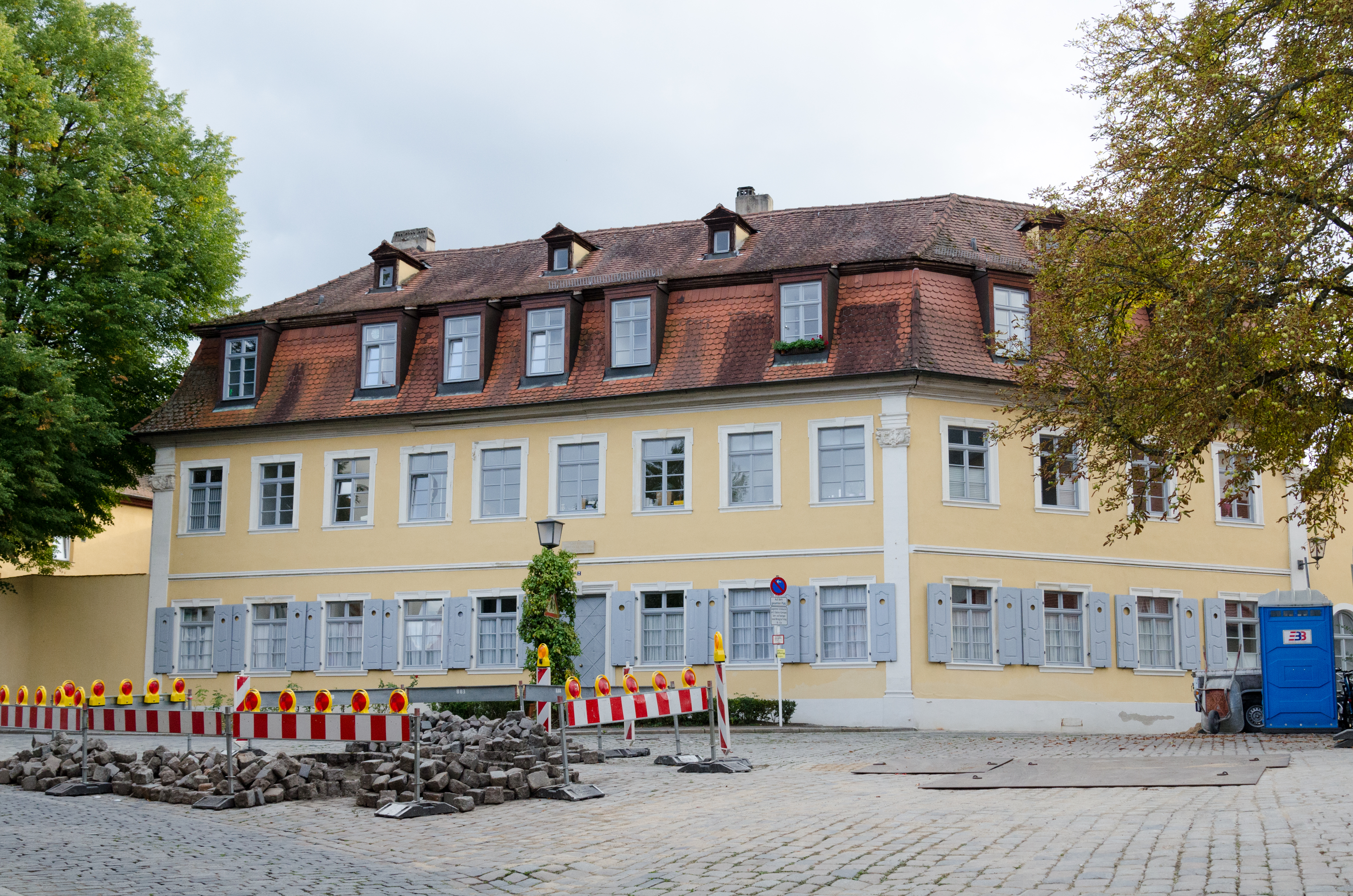 Bamberg, Oberer Stephansberg 2, von Osten